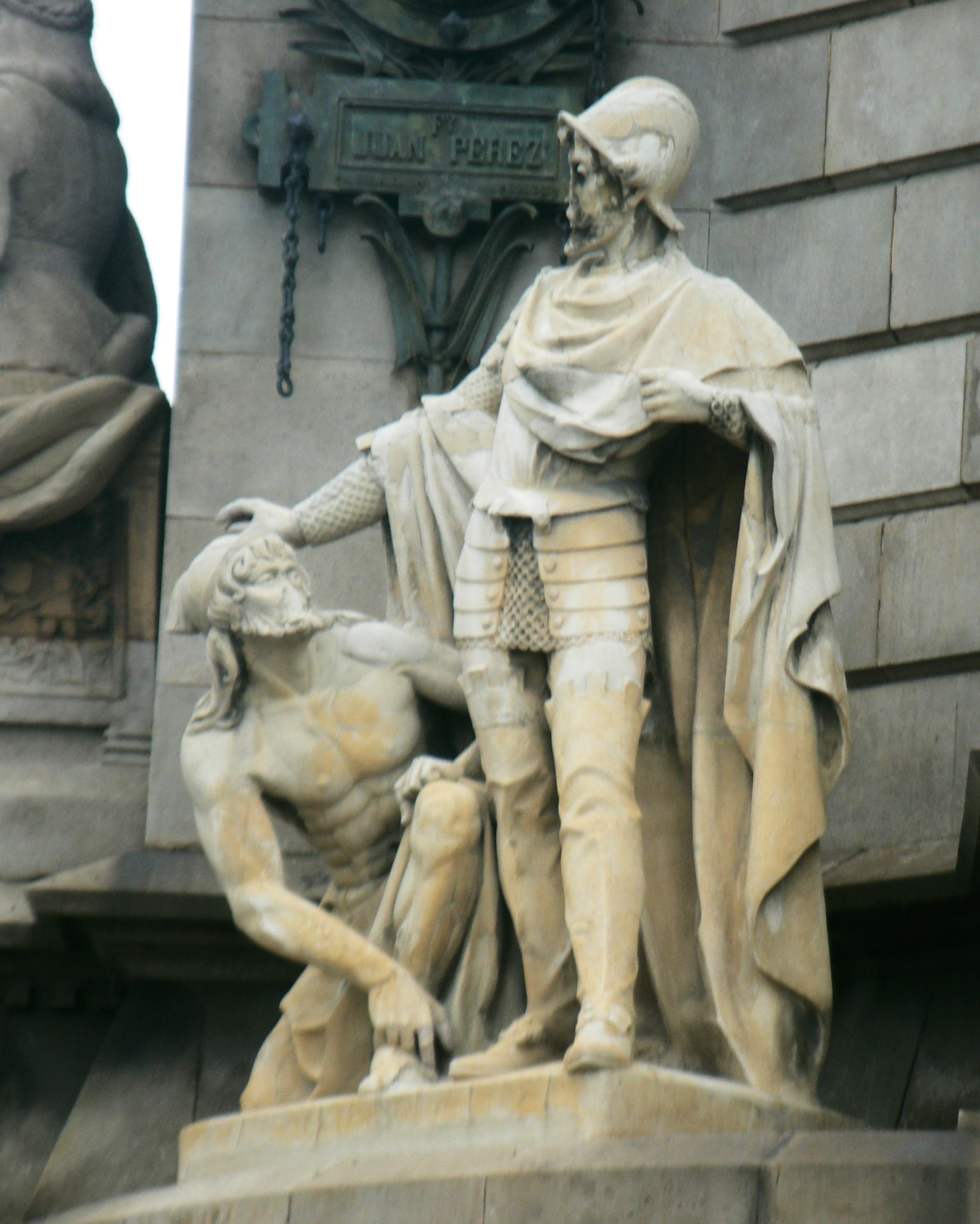 Pere Bertran Margarit, originari de l'Empordà, cap militar del segon viatge de Cristòfor Colom, Estatua al monument a Colom de Barcelona